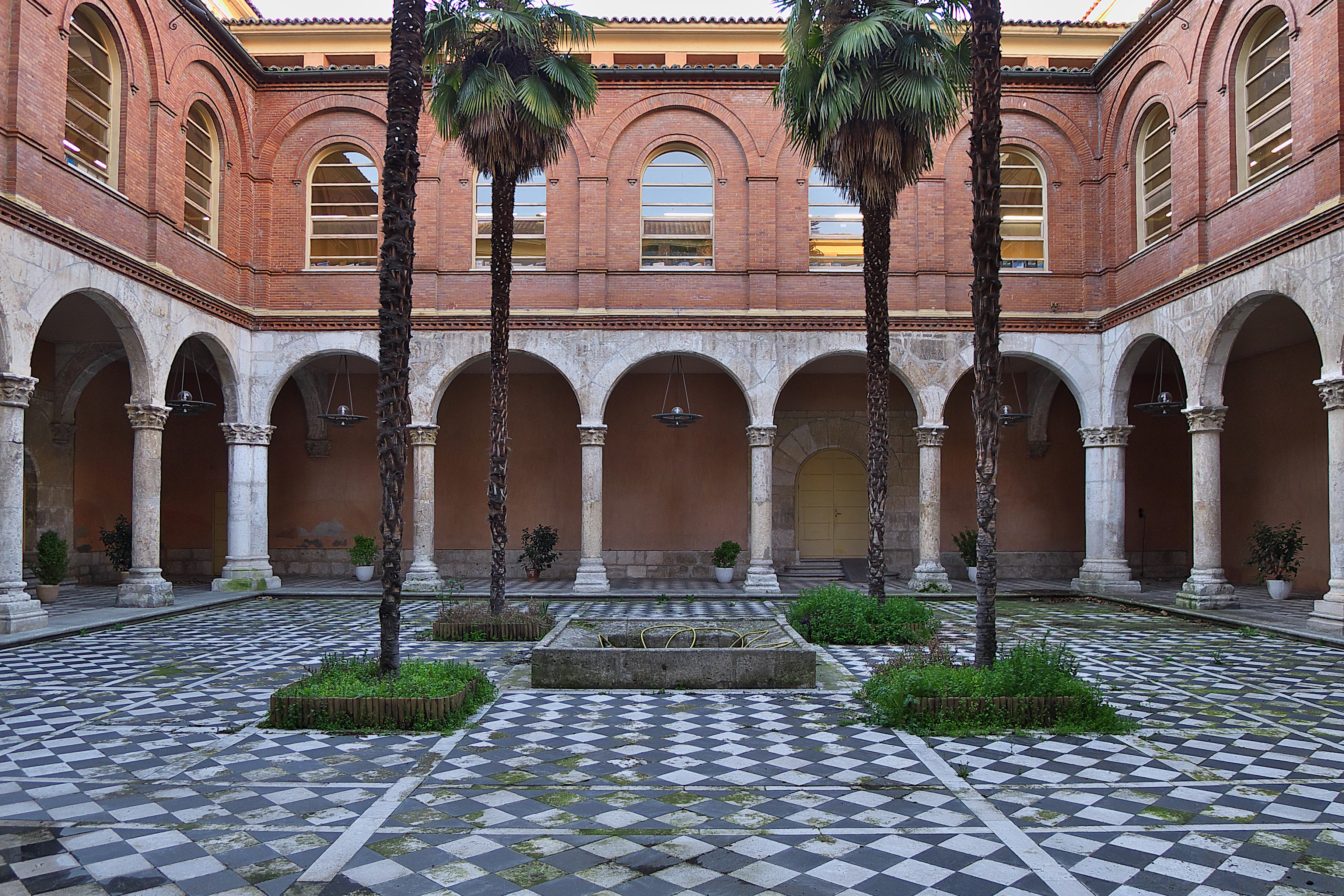 Juan Alonso Pimentel de Herrera y Quiñones establece en Valladolid la Casa de Benavente.